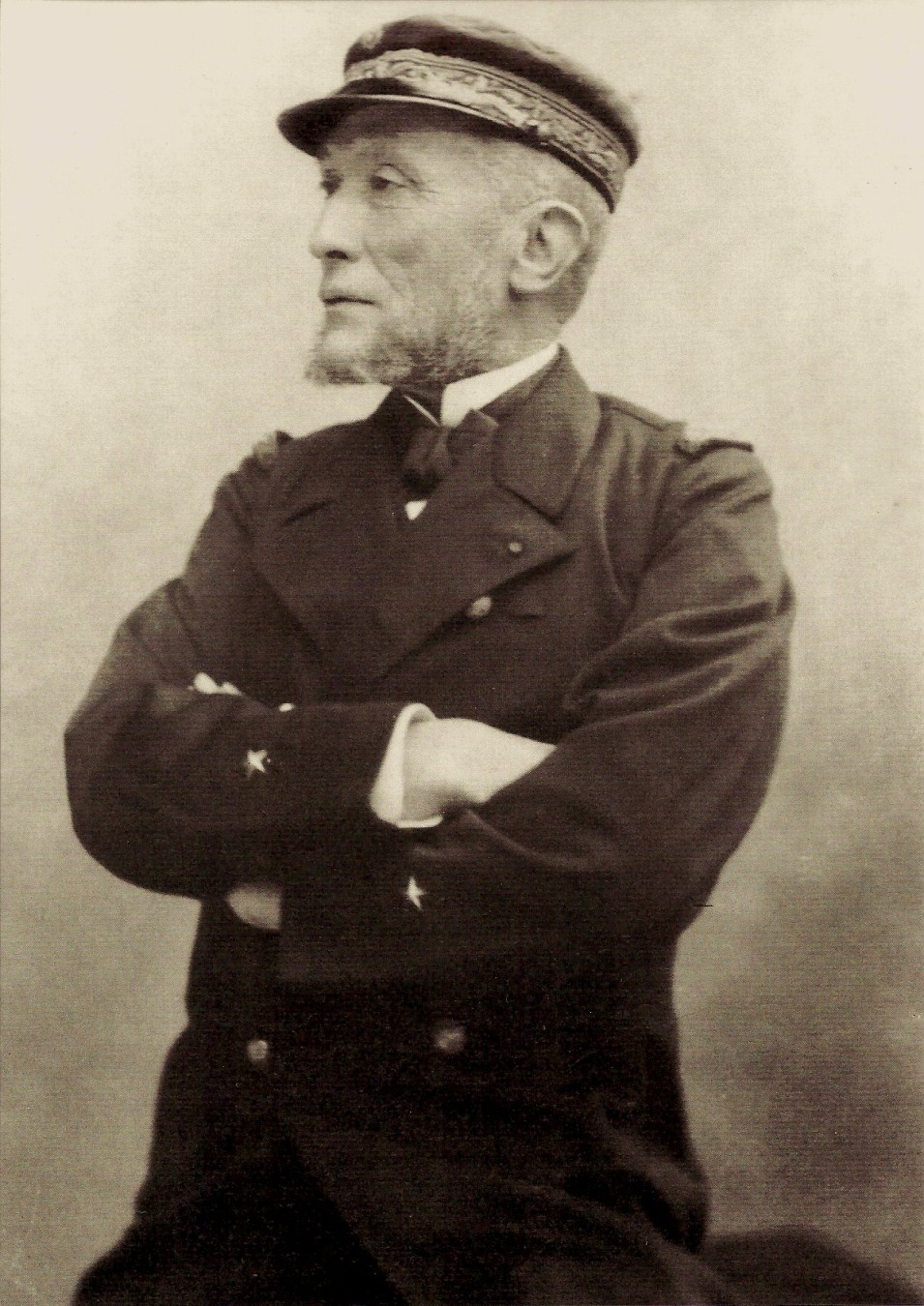 Bertrand de Montesquiou-Fézensac est l'époux d'Émilie de Pérusse des Cars (1844-1901) et le beau-frère de Hélène Standish. Il est né à Paris le 28 mars 1837 et meurt dans la capitale le 24 juillet 1902. Officier de marine, il est le propriétaire du château de Hauteville à Charchigné dans le département de la Mayenne. Sa fille unique est Mathilde de Montesquiou-Fézensac (1883-1960).